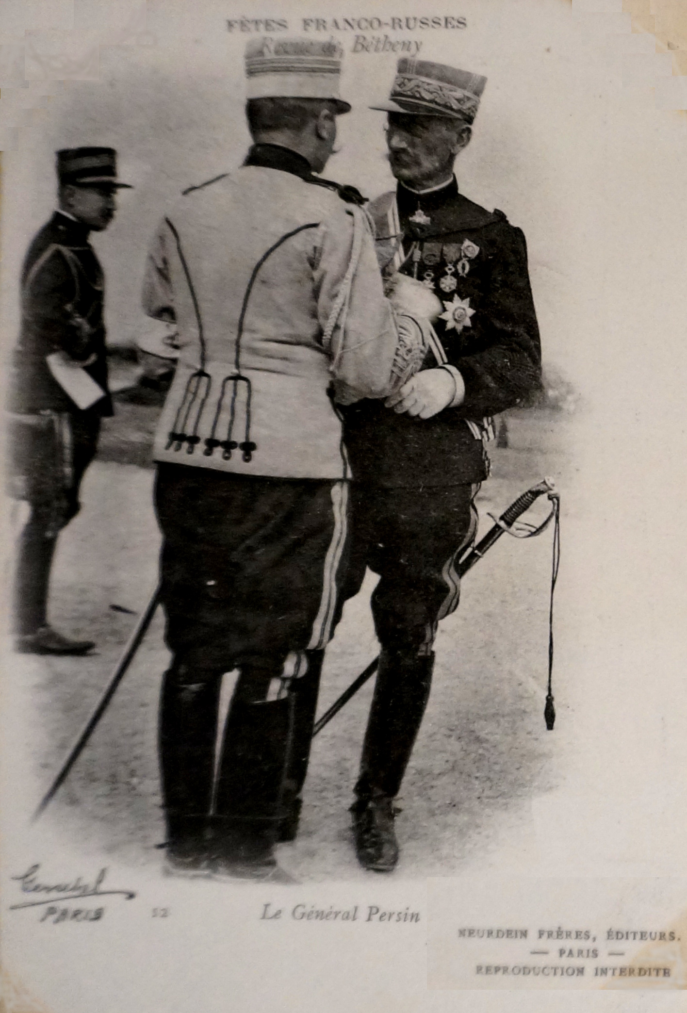 de la BM de Reims sous la côte CPA t4.